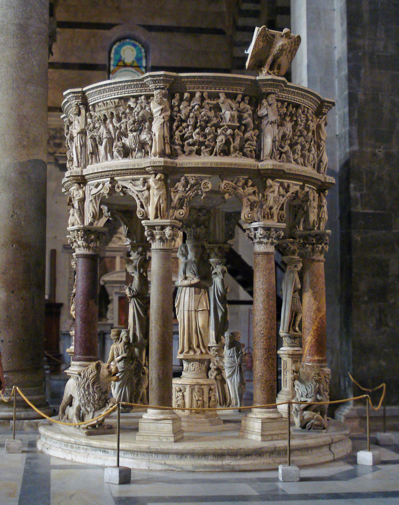 Púlpito da Catedral de Pisa